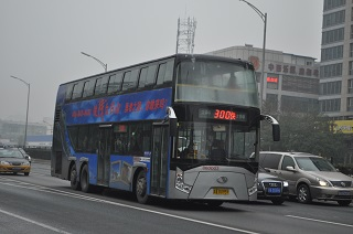 北京公交线路